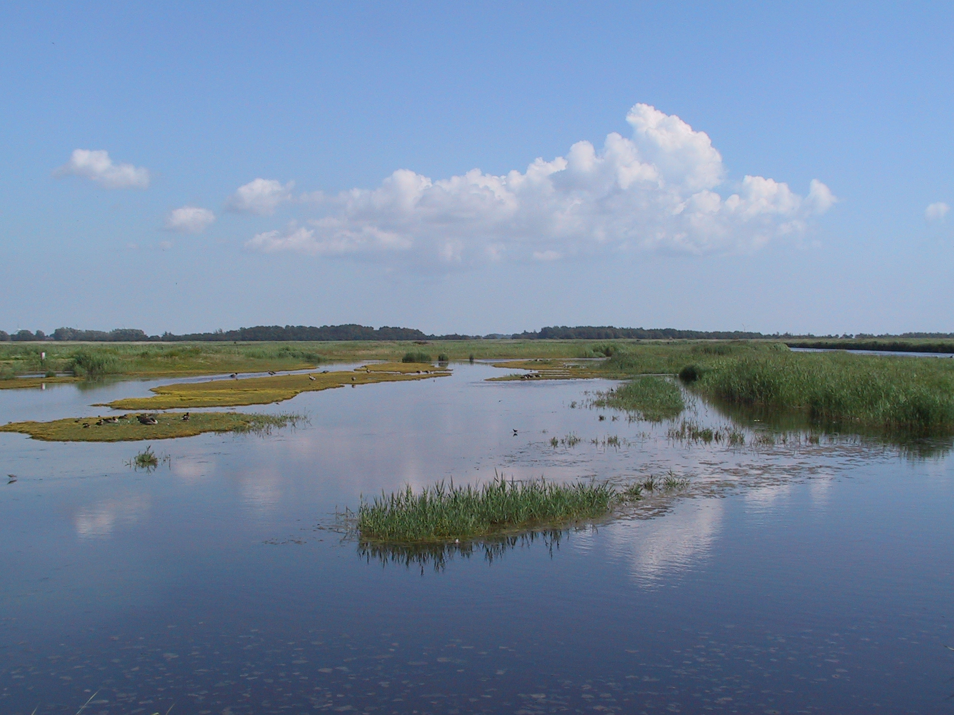 Wallnau